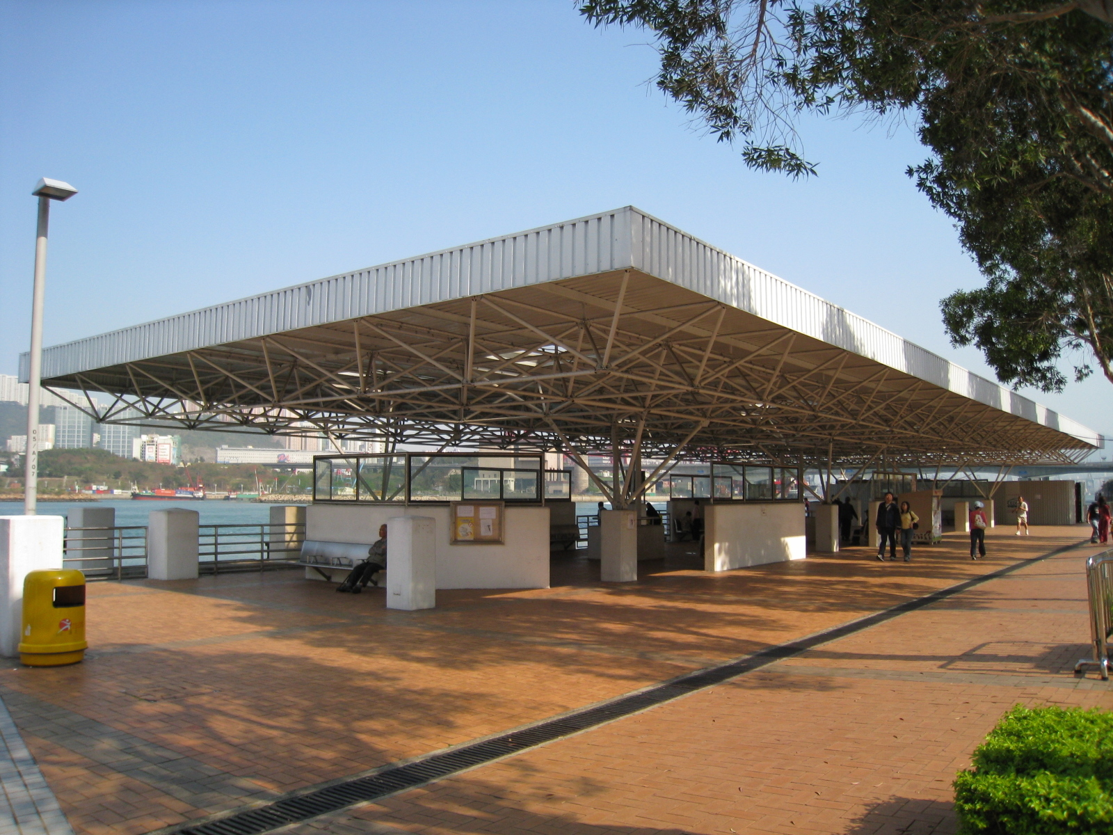 HK Tsing Yi Pier